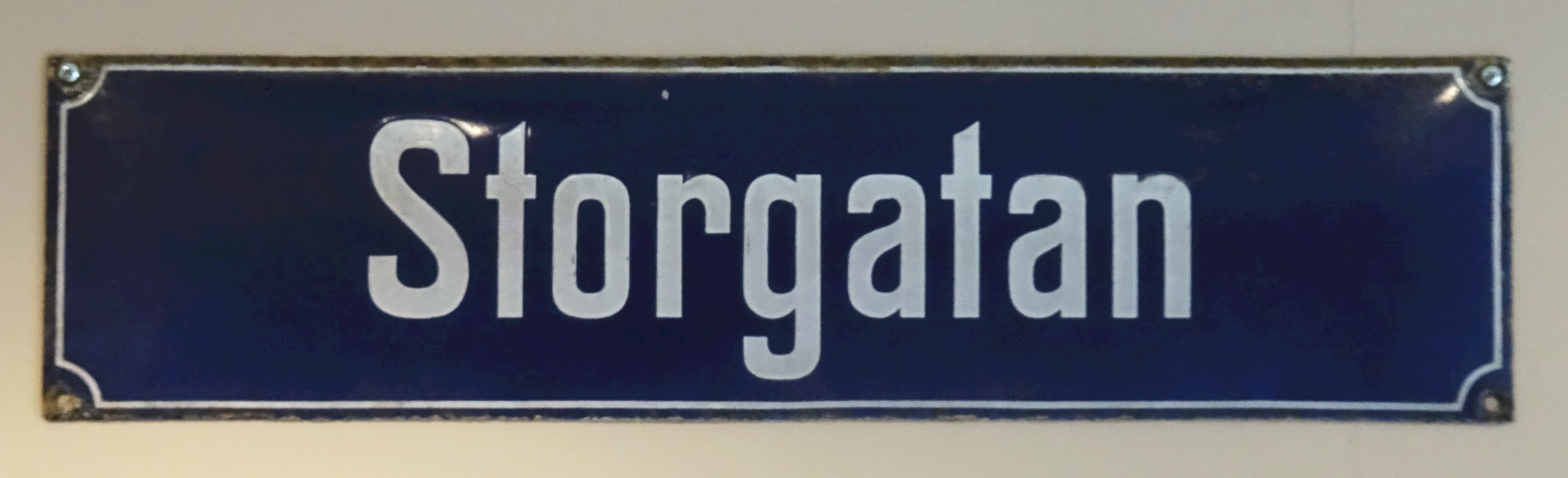 Södertäljes stadsmuseum, skylt Storgatan